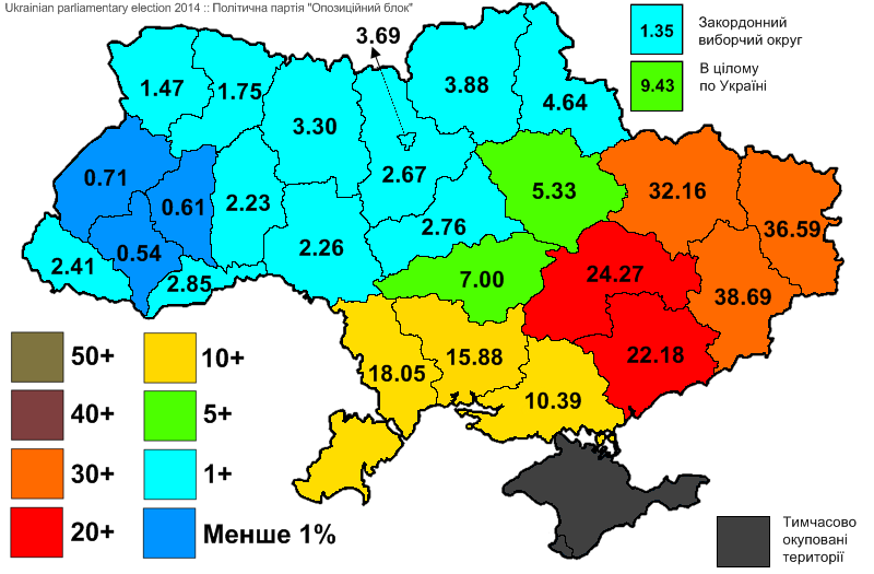 Результати виборів до Верховної Ради України, які відбулись 25 жовтня 2014 року. Інформація з офіційного сайту ЦВК. Політична партія "Опозиційний блок".